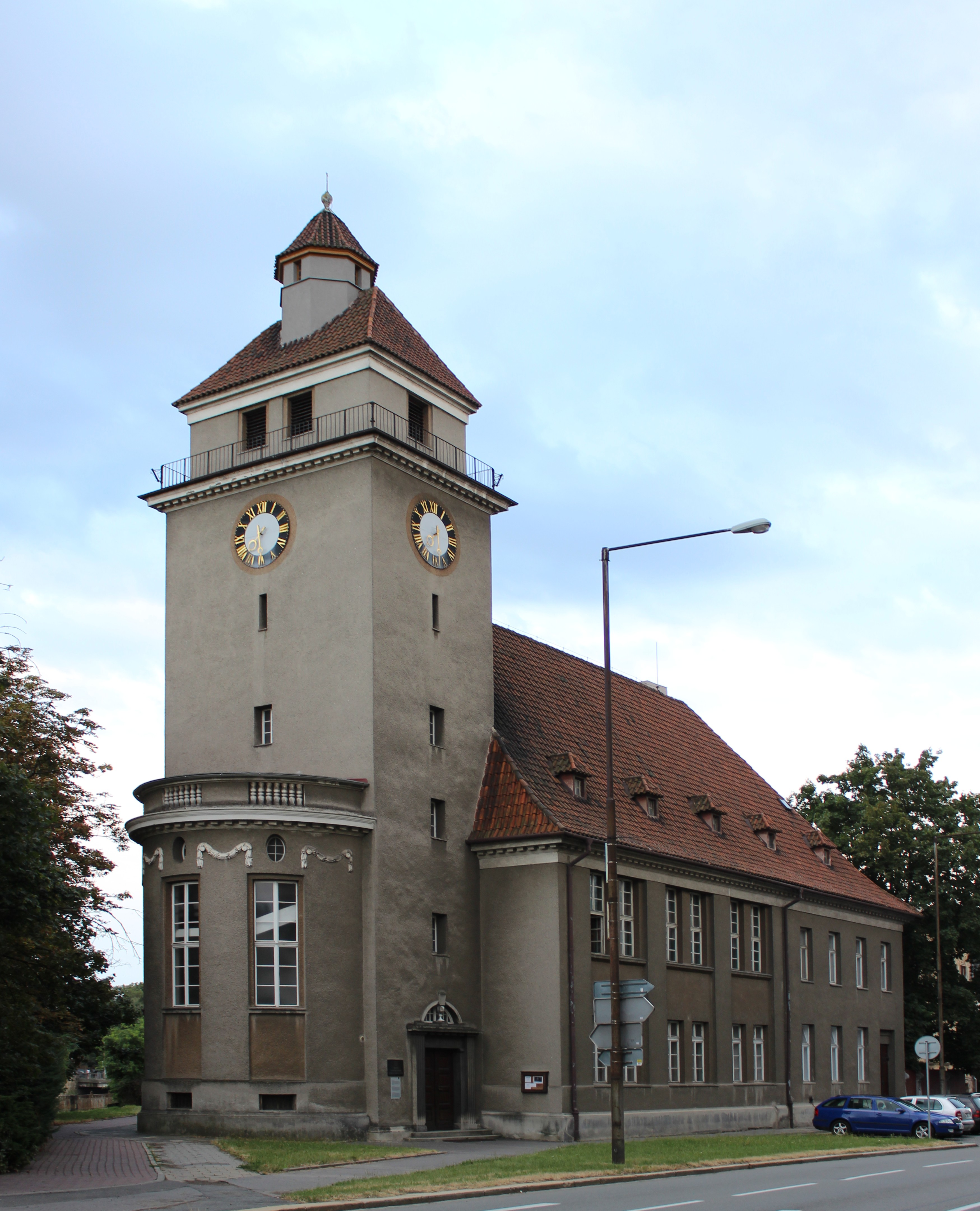 Kostel Farního sboru Českobratrské církve evangelické v Olomouci (pohled od severozápadu).